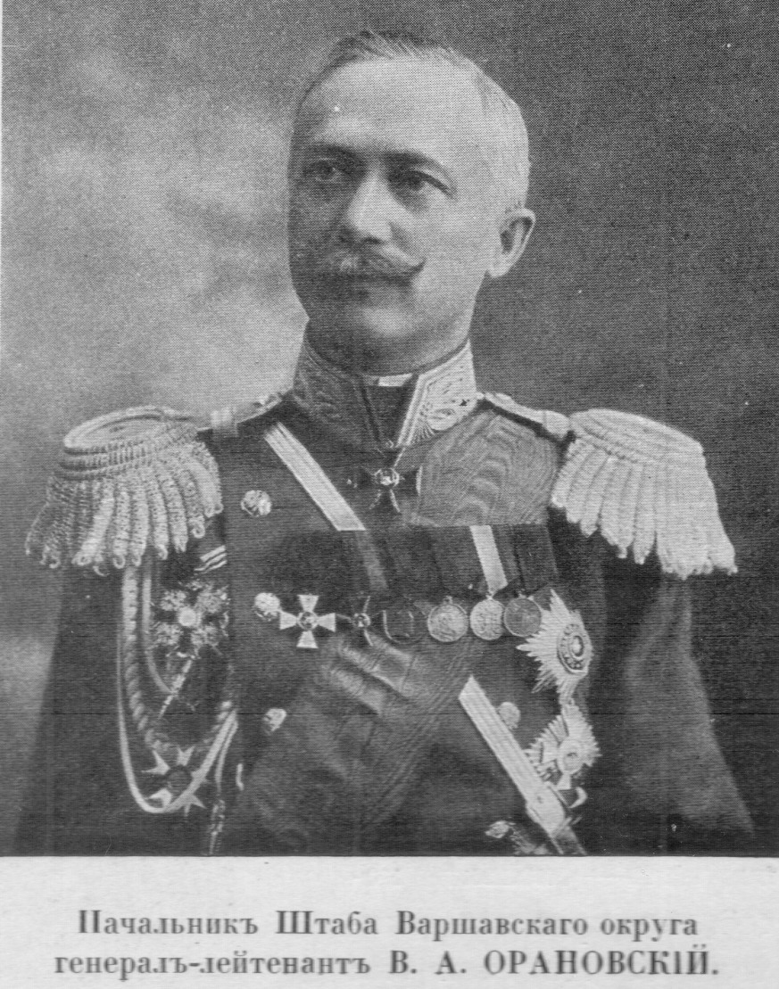 Начальникъ Штаба Варшавскаго округа генералъ-лейтенантъ ВЛАДИМІРЪ АЛОИЗІЕВИЧЪ ОРАНОВСКІЙ.